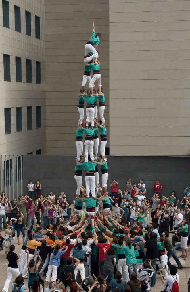 Primer castell de vuit pisos descarregat per una colla castellers universitaria.